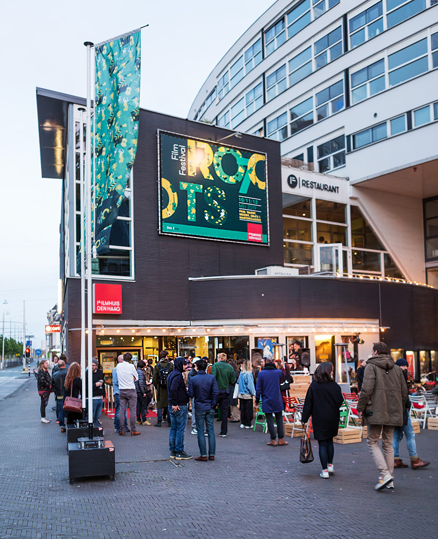 Mei 2019: Roots Film Festival in Filmhuis Den Haag